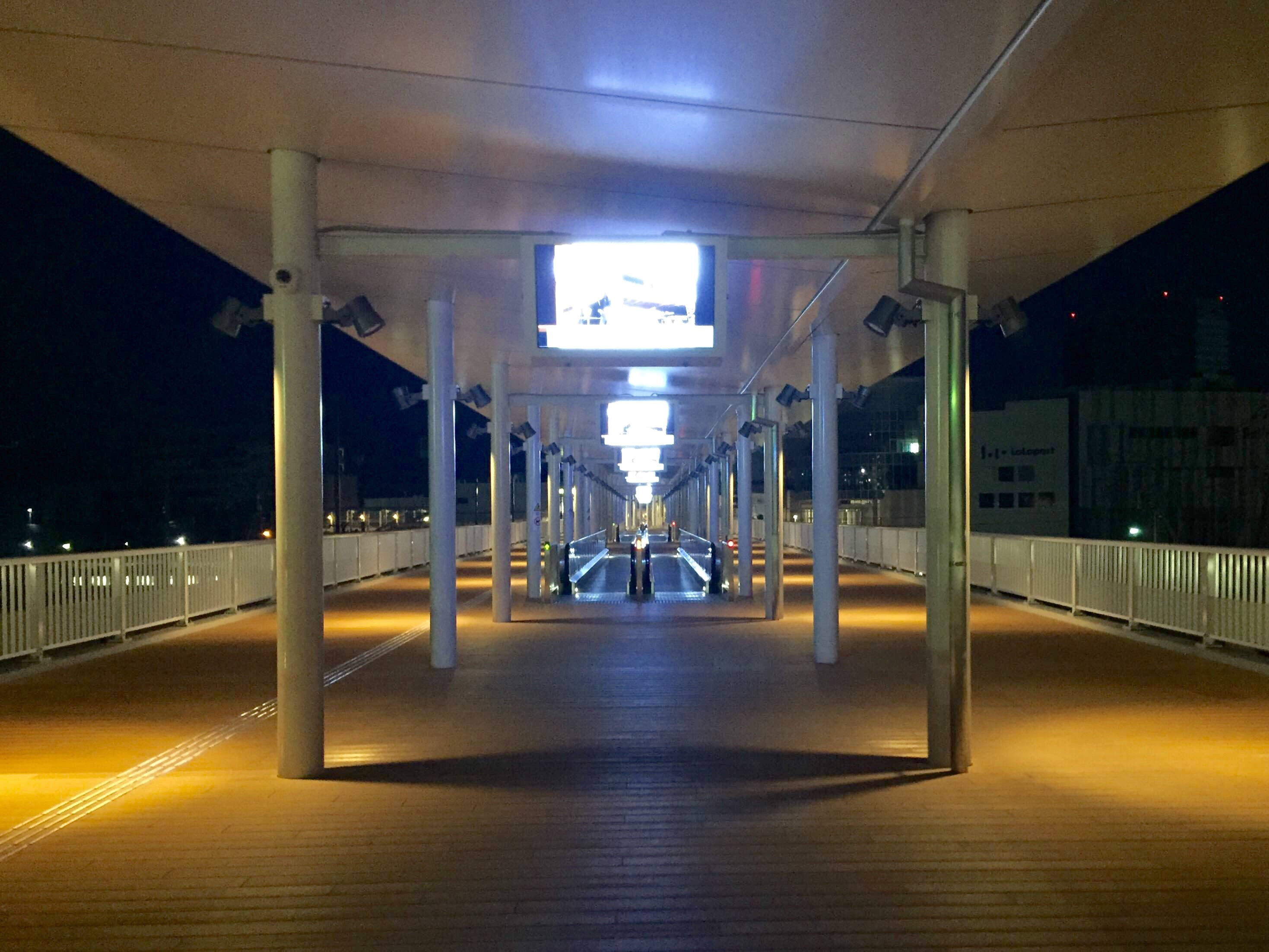 2015年10月に完成した小田急〜JRの駅舎間における新自由通路。